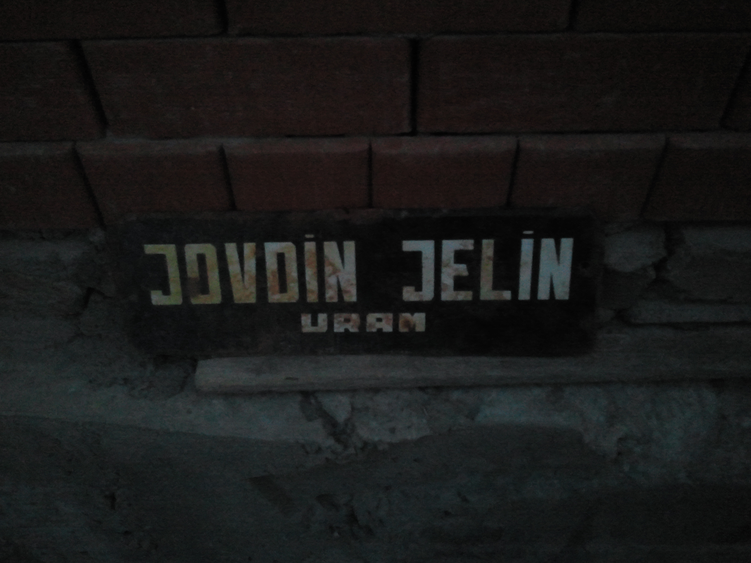 Название одной из улиц с.Цоци-Юрт на чеченском языке латиницей 1992 года, времен ЧРИ Нохчийн: Цоцин Эвлан ураман цIе Нохчийн маттаца 1992 шеран латинийцица, НРИ йолу хенара / Tsotsyn Ewlan uraman tze Nochcyn mettatsa 1992 sheran latinytsitsa, NRI jolu chenara.